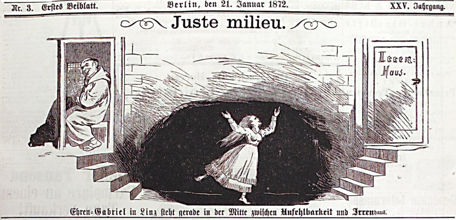 Karikatur zur Beichtstuhl-Affäre aus dem Kladderadatsch vom 21.01.1872